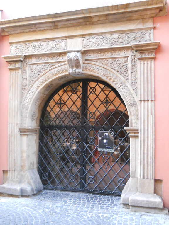 Poznań, ul. Wodna 27 - Pałac Górków, obecnie Muzeum Archeologiczne (wejście na dziedziniec)